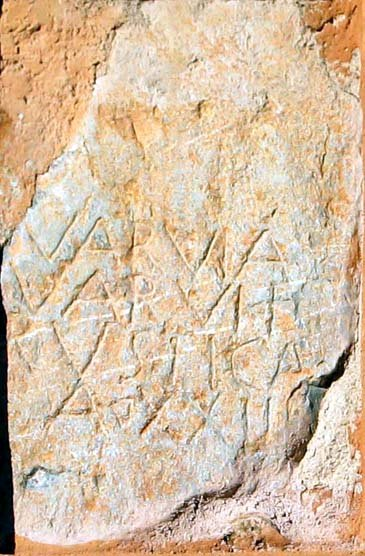 Castellón (Comunidad Valenciana) España. Azuébar. (provincia de Castellón). Lápida romana. Esta imagen cuenta con el consentimiento de la Federación Valenciana de Municipios y Provincias para su difusión. Corresponde con la inscripción CIL II 4030 = CIL II14 715, y su texto dice: VARVIA/ VARVI F(ilia)/ RVSTICA/ A(nnorum) XXIIII. Usuario : Pelayo2